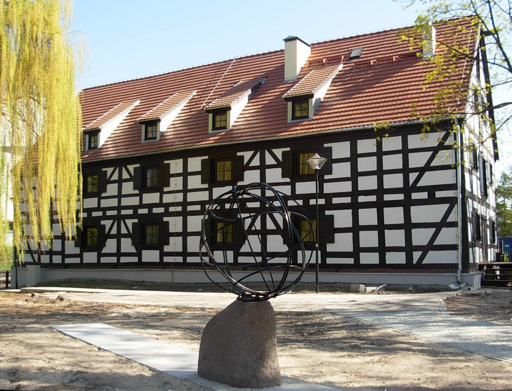 Pomnik 18 południka na Wyspie Młyńskiej w Bydgoszczy